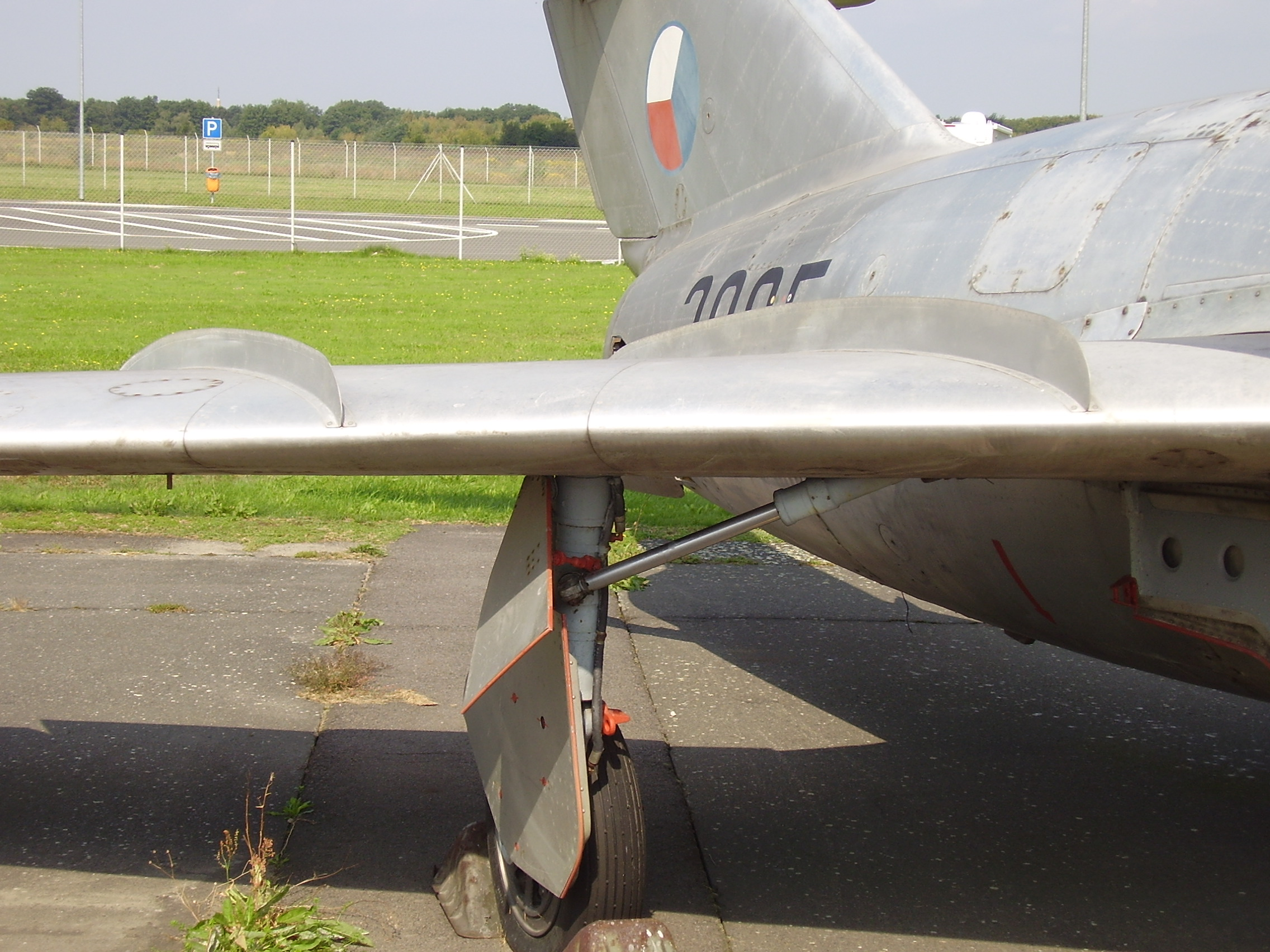 Luftwaffenmuseum der Bundeswehr; Airforce Museum of the Bundeswehr; Berlin-Gatow